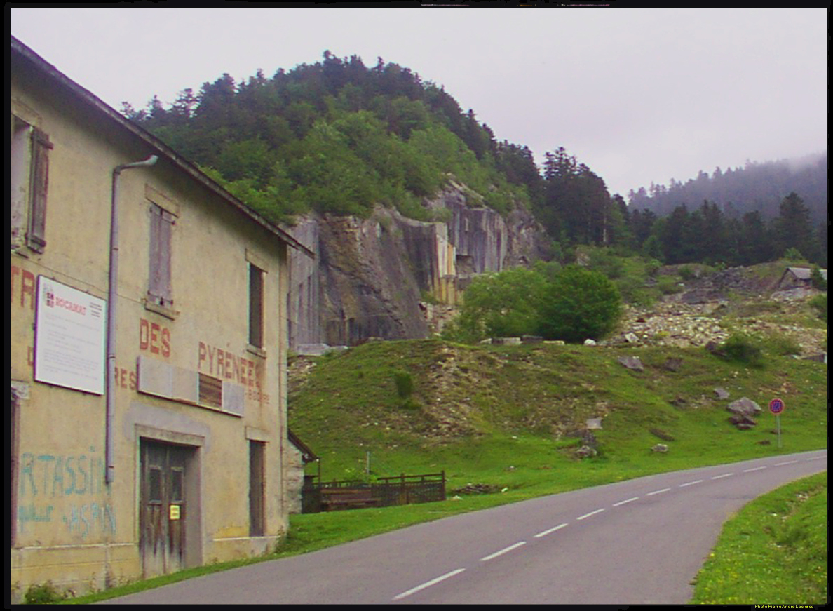 Village de Campan dans les Hautes-Pyrénées Midi-Pyrénées